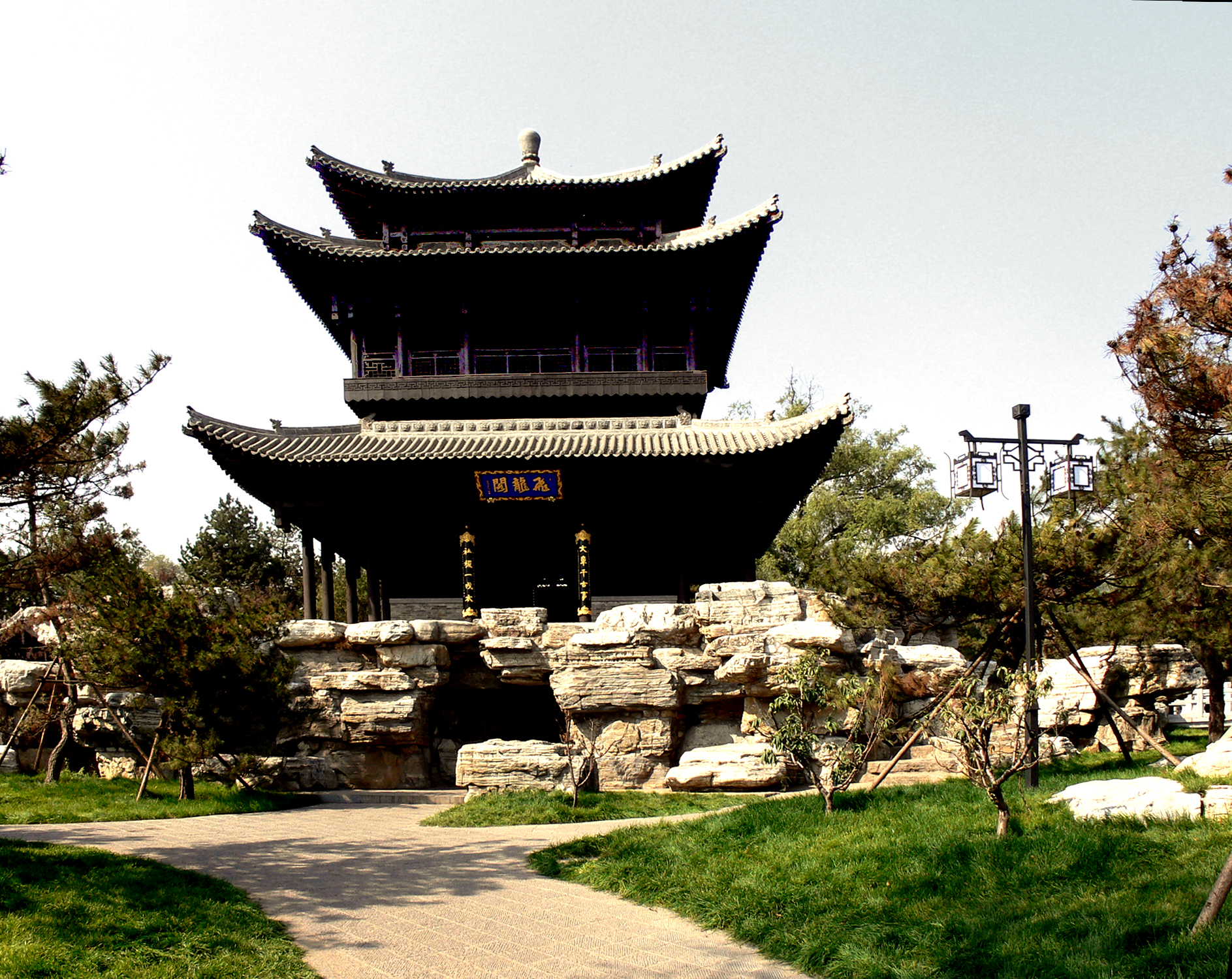 晋祠飞龙阁